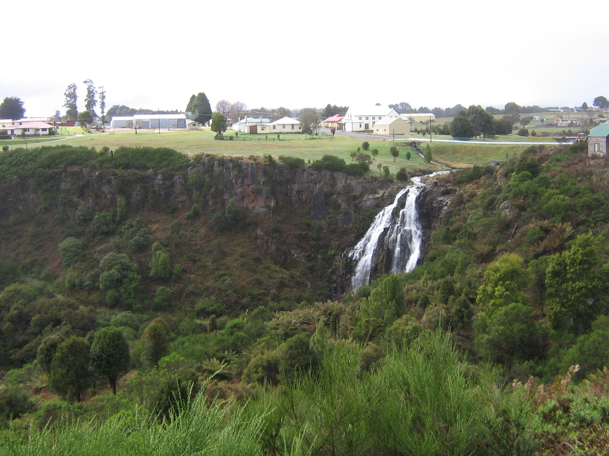 Waratah Falls in Waratah, Tasmania